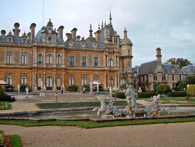 Waddesdon Manor